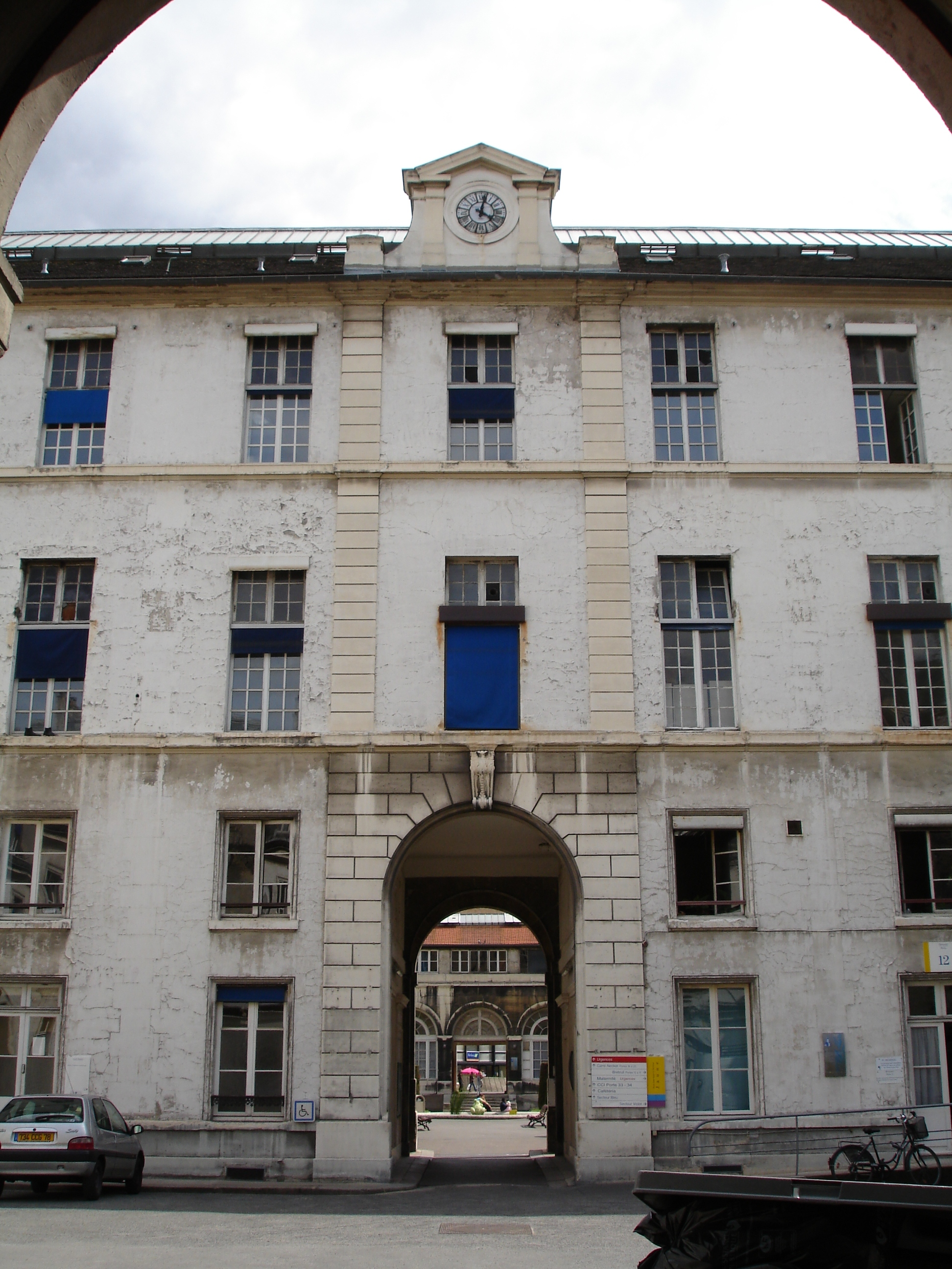 Hopital Necker, Rue de Sevres, Paris, France